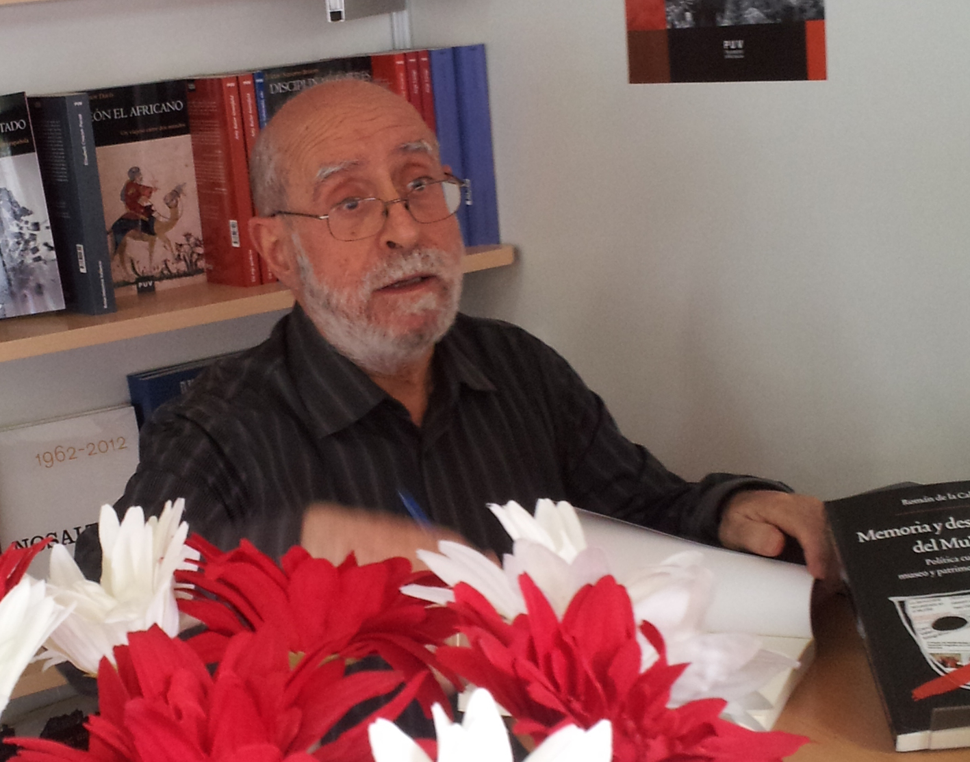 Román de la Calle a la 50 Fira del Llibre de València.